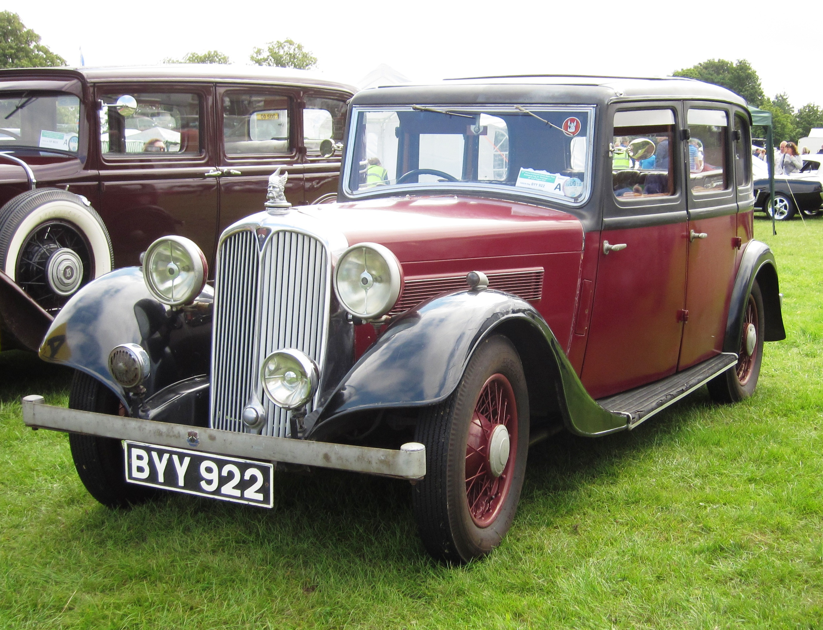 Rover 14 berline d'annees 30